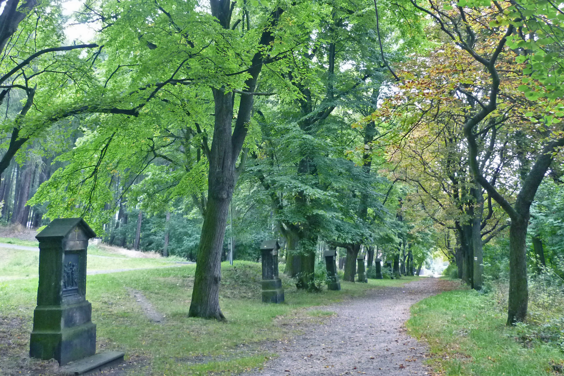 Kreuzweg in Mariaschein (Bohosudov)